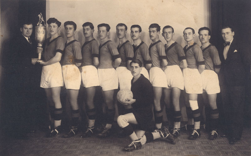 Спортен клуб Тича - Варна. Групов портрет с купа "Варна" 1934 г.